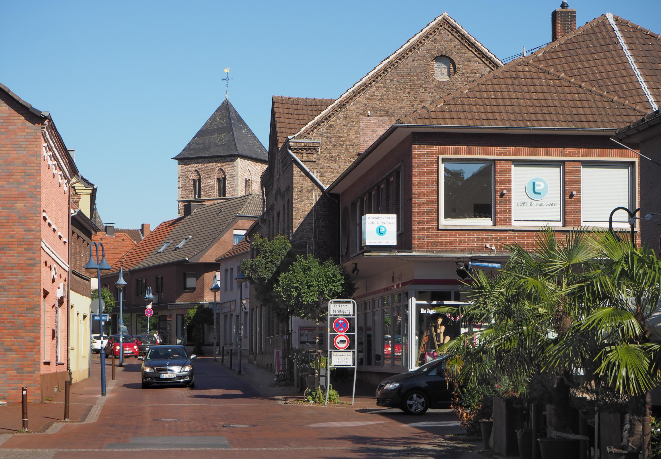 Schermbeck, NRW, Mittelstraße, Foto: Oktober 2015